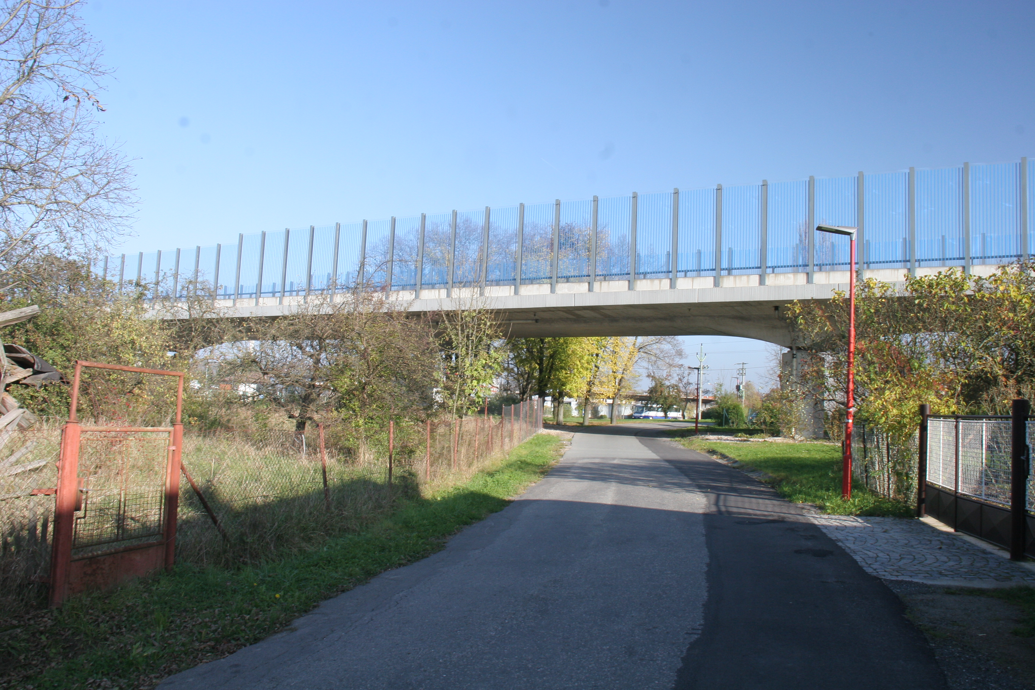 Podhráz most